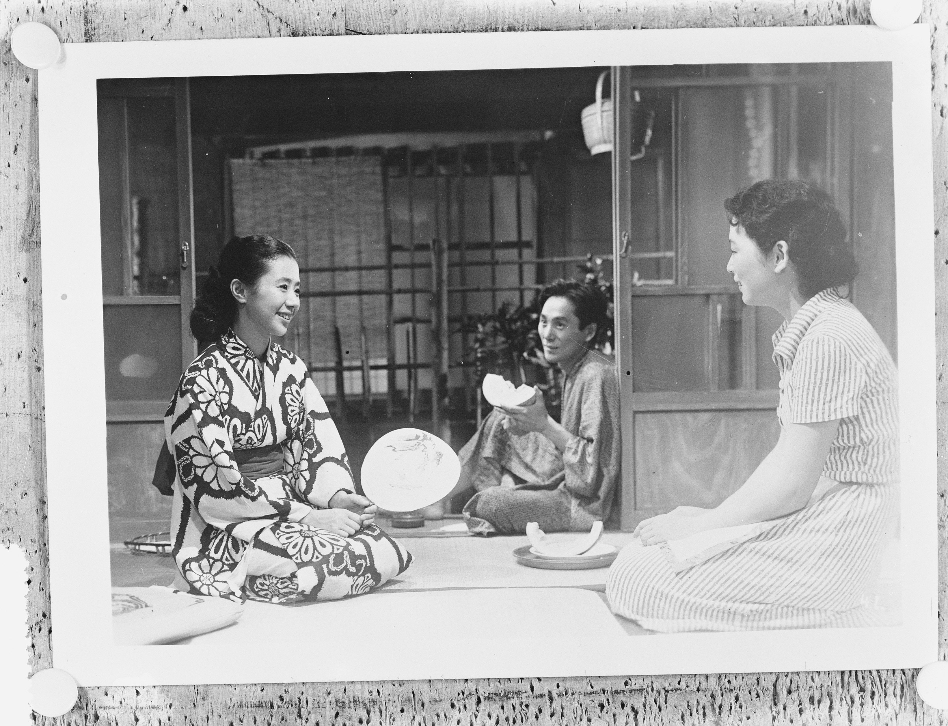 Collectie / Archief : Fotocollectie Anefo Reportage / Serie : [ onbekend ] Beschrijving : Reprodukties Hiroschima (Royal Film) Datum : 4 maart 1954 Locatie : Hiroshima Trefwoorden : FILM, Reprodukties Persoonsnaam : ROYAL Fotograaf : Doka / Anefo Auteursrechthebbende : Nationaal Archief Materiaalsoort : Glasnegatief Nummer archiefinventaris : bekijk toegang 2.24.01.09 Bestanddeelnummer : 906-3241